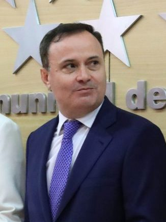 La alcaldesa de Madrid, Manuela Carmena ha firmado hoy, miércoles 17 de mayo, el Pacto Regional por la Cañada Real Galiana junto a Cristina Cifuentes, presidenta del Gobierno de la Comunidad de Madrid; Concepción Dancausa, delegada de Gobierno en Madrid; Pedro del Cura, alcalde de Rivas Vaciamadrid; y Ángel Viveros, alcalde de Coslada. También han rubricado el acuerdo los portavoces de los grupos parlamentarios en la Asamblea de Madrid Ignacio Aguado, de Ciudadanos; Lorena Ruiz-Huerta, de Podemos; Ángel Gabilondo, del grupo Socialista; y Enrique Ossorio, del partido Popular.